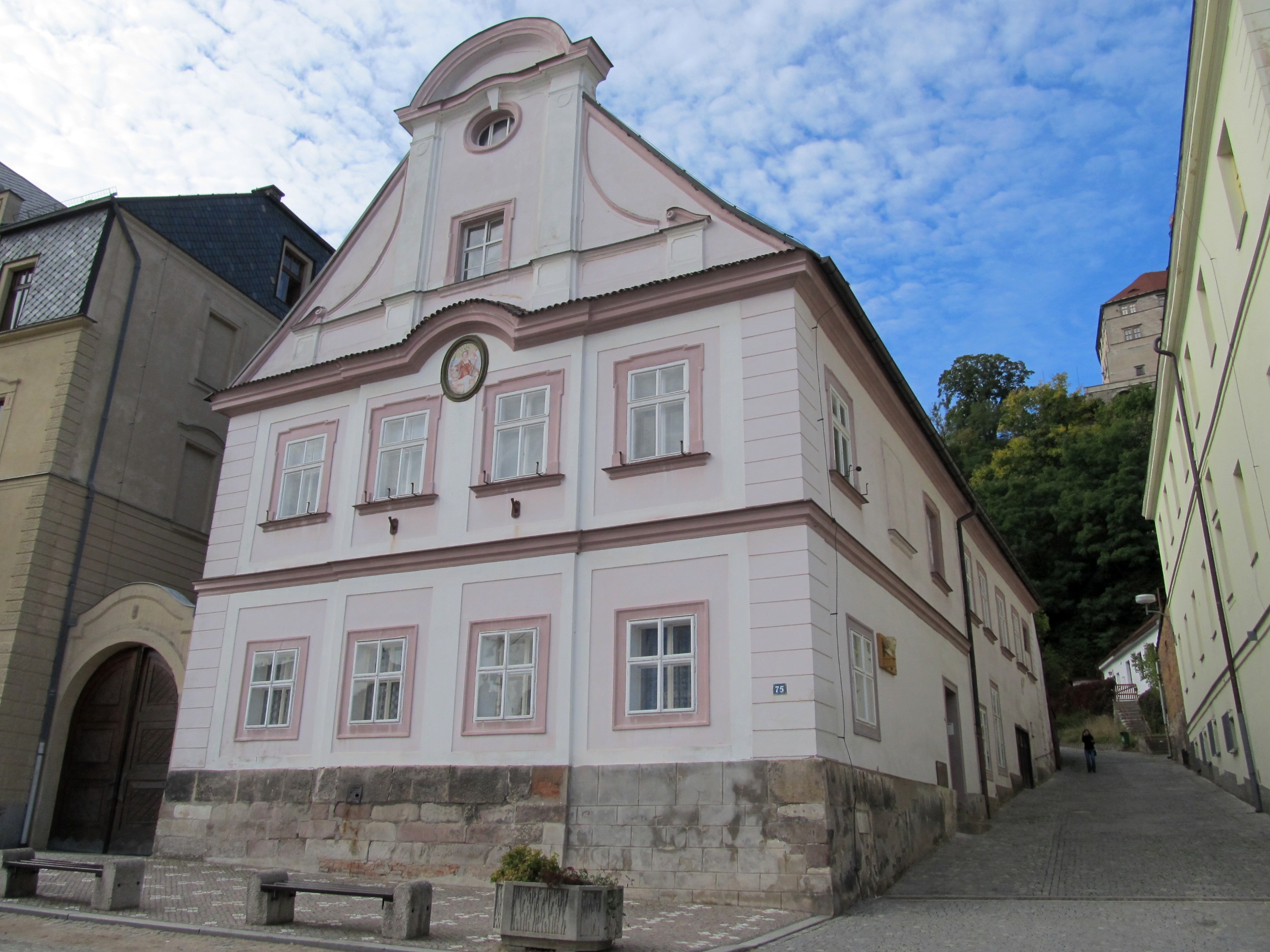 Děkanství (Náchod), Masarykovo náměstí 75, Náchod